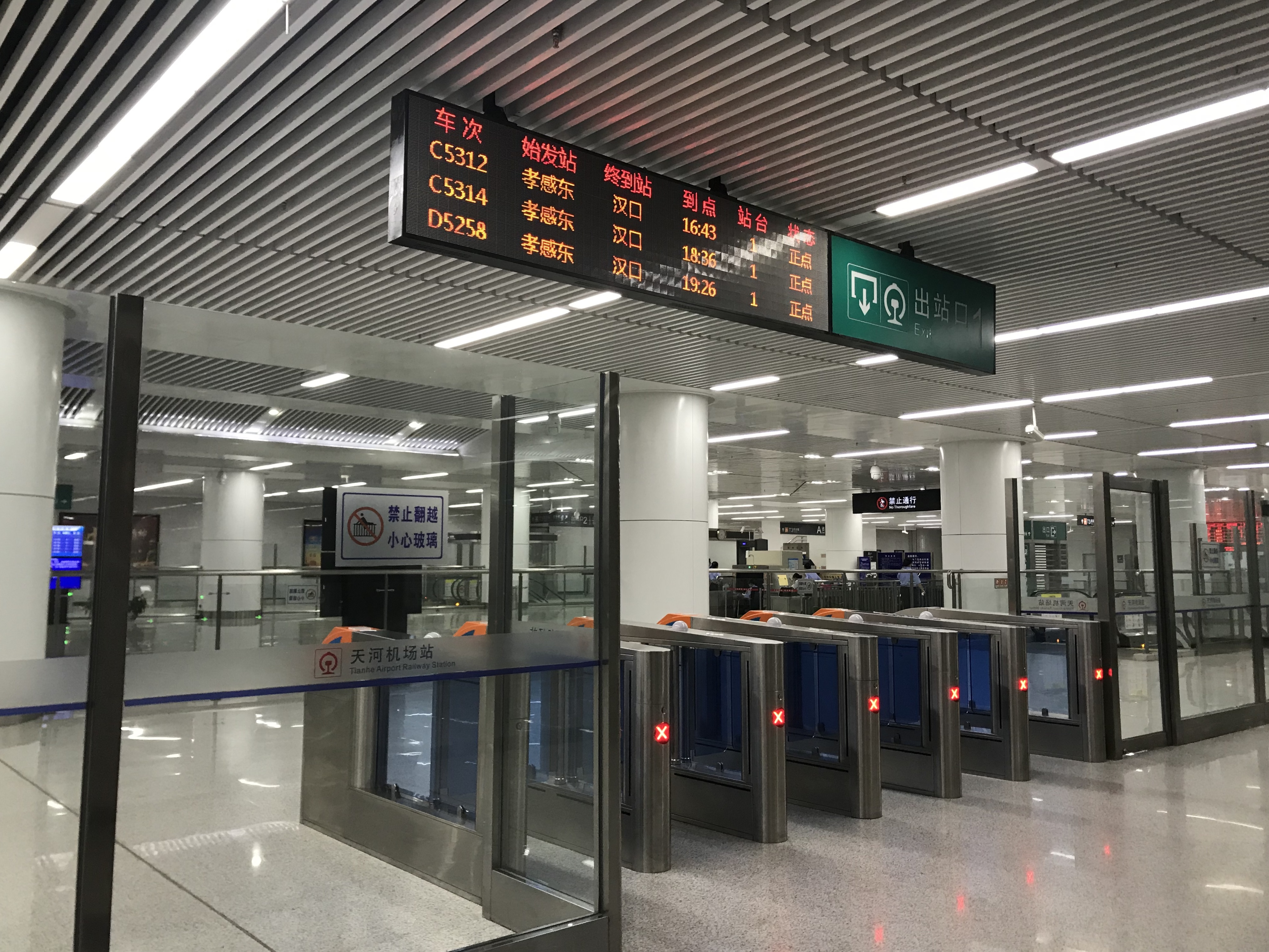 天河空港駅(武孝都市間鉄道)の改札口と発車標